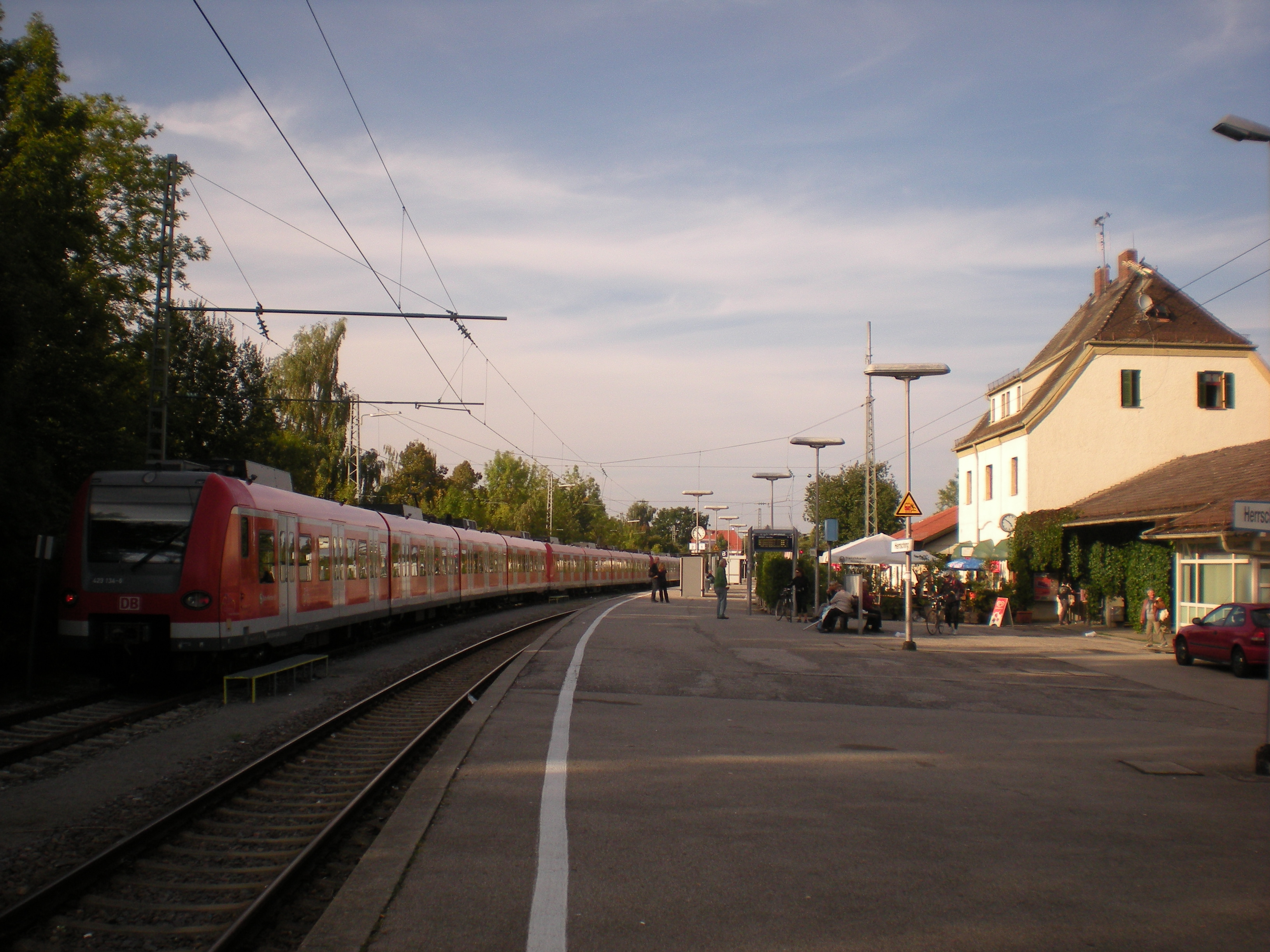 Bahnsteig des Bahnhofs Herrsching mit Zug der Baureihe 423